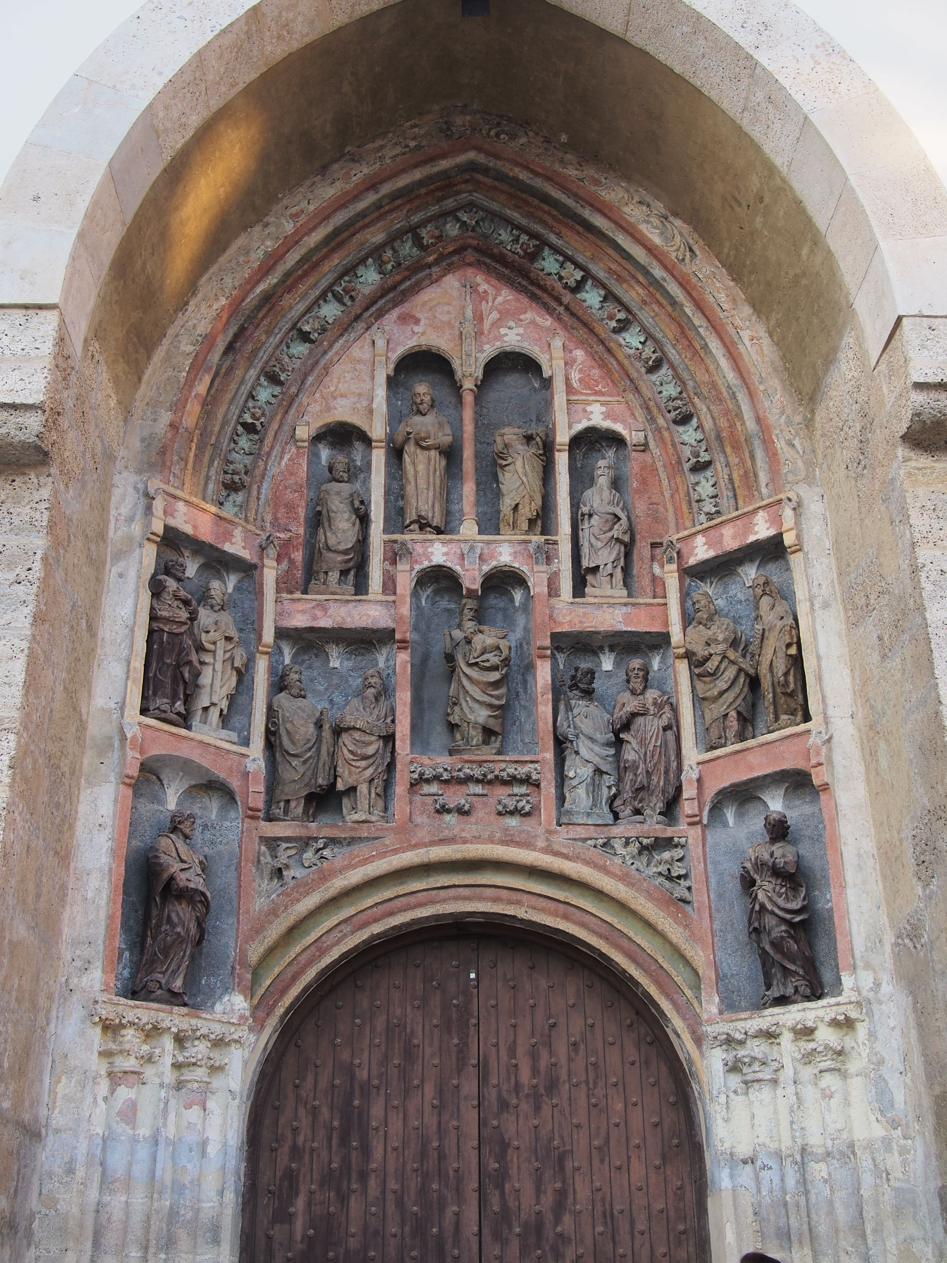 Südportal der St. Markuskirche der Oberstadt (Gornji Grad) von Zagreb